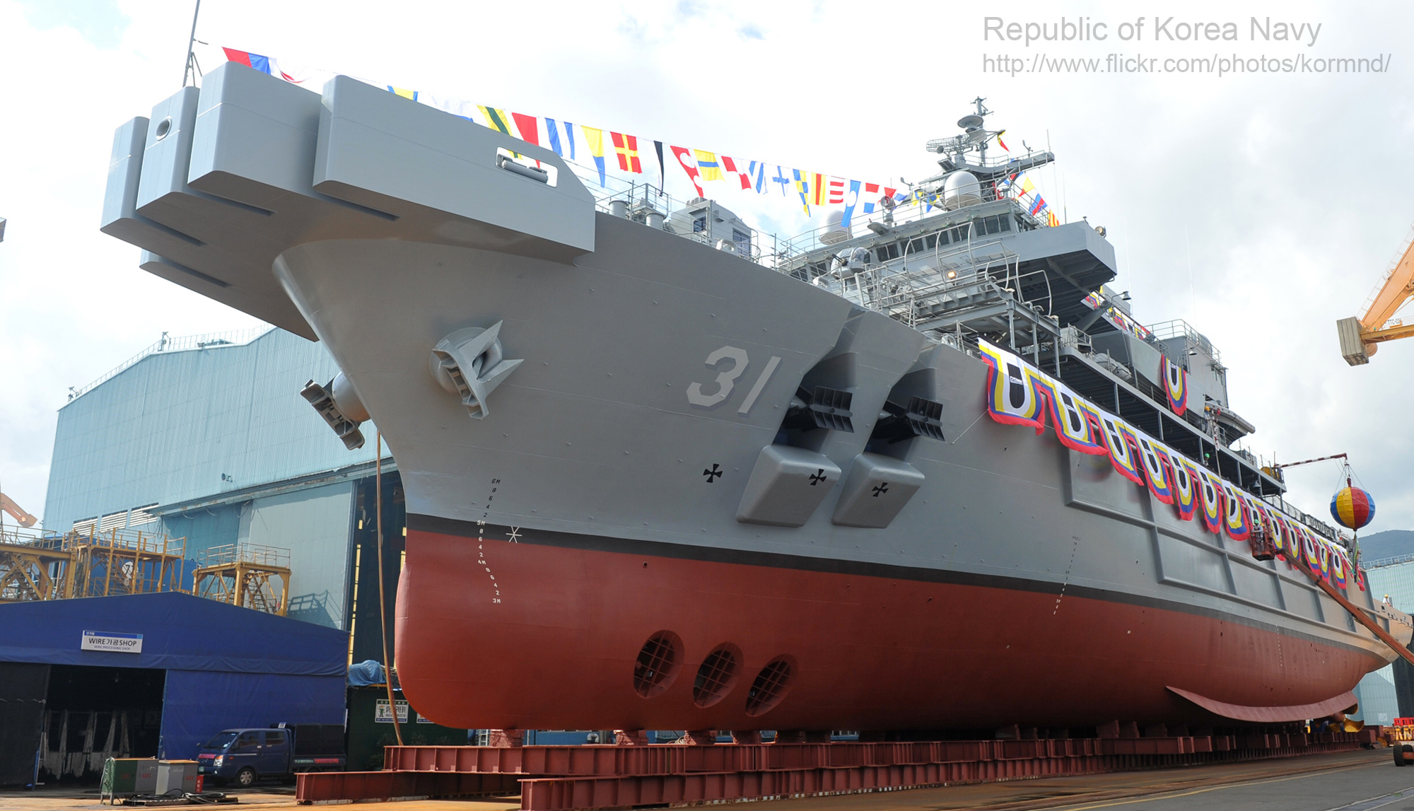 2012. 9. 4 거제 대우해양조선에서 열린 통영함 진수식 사진입니다 촬영자 : 강진욱, 김상근, 안정민